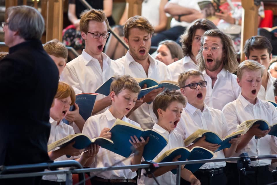 Tölzer Knabenchor lors de la Messe en Si de Bach à Leipzig.